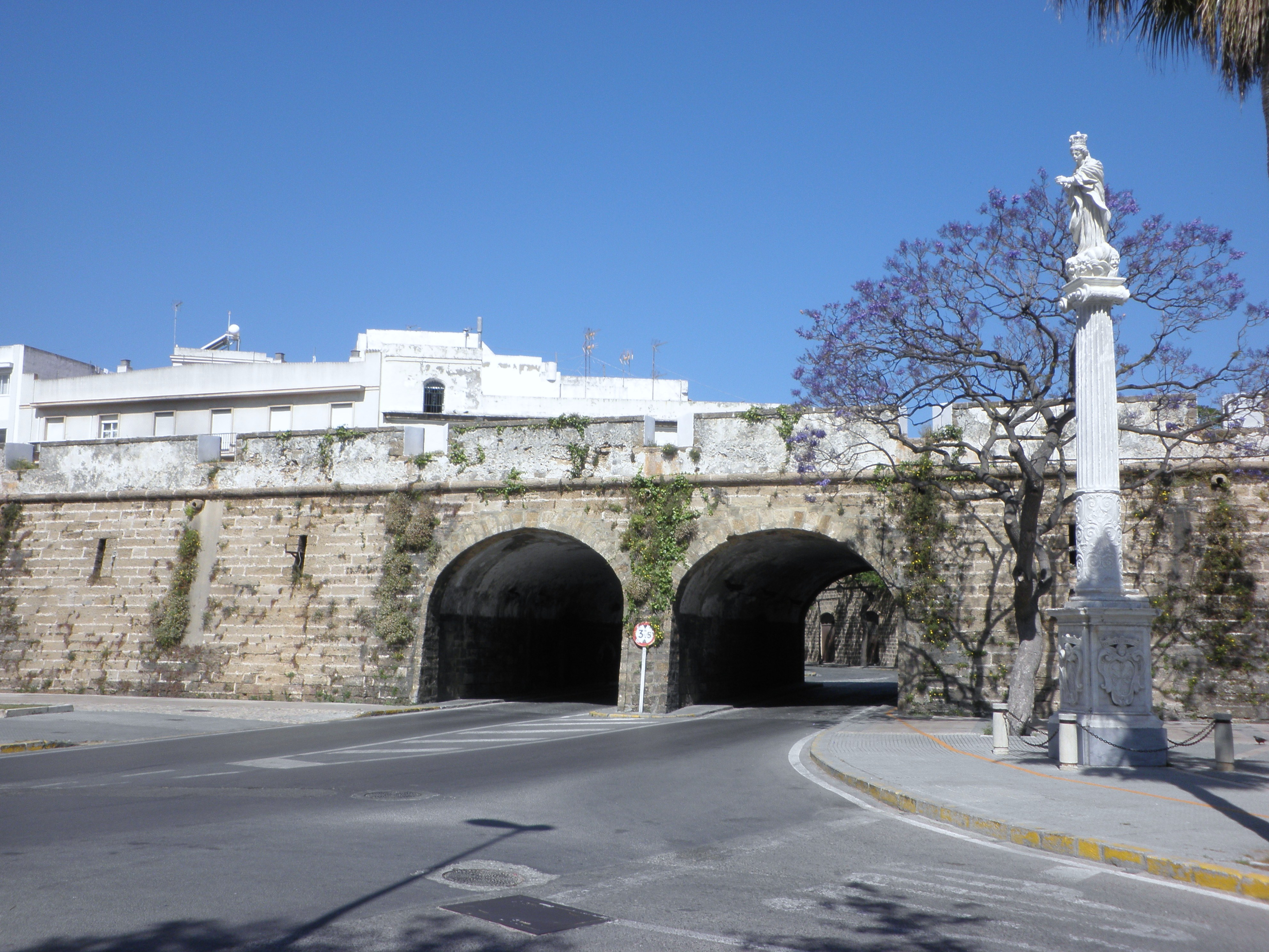 Murallas de San Carlos, Cádiz, España